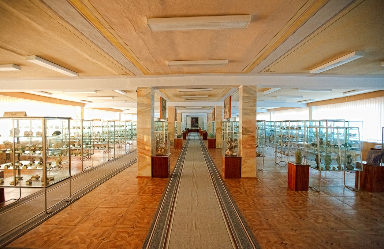 Музей університету